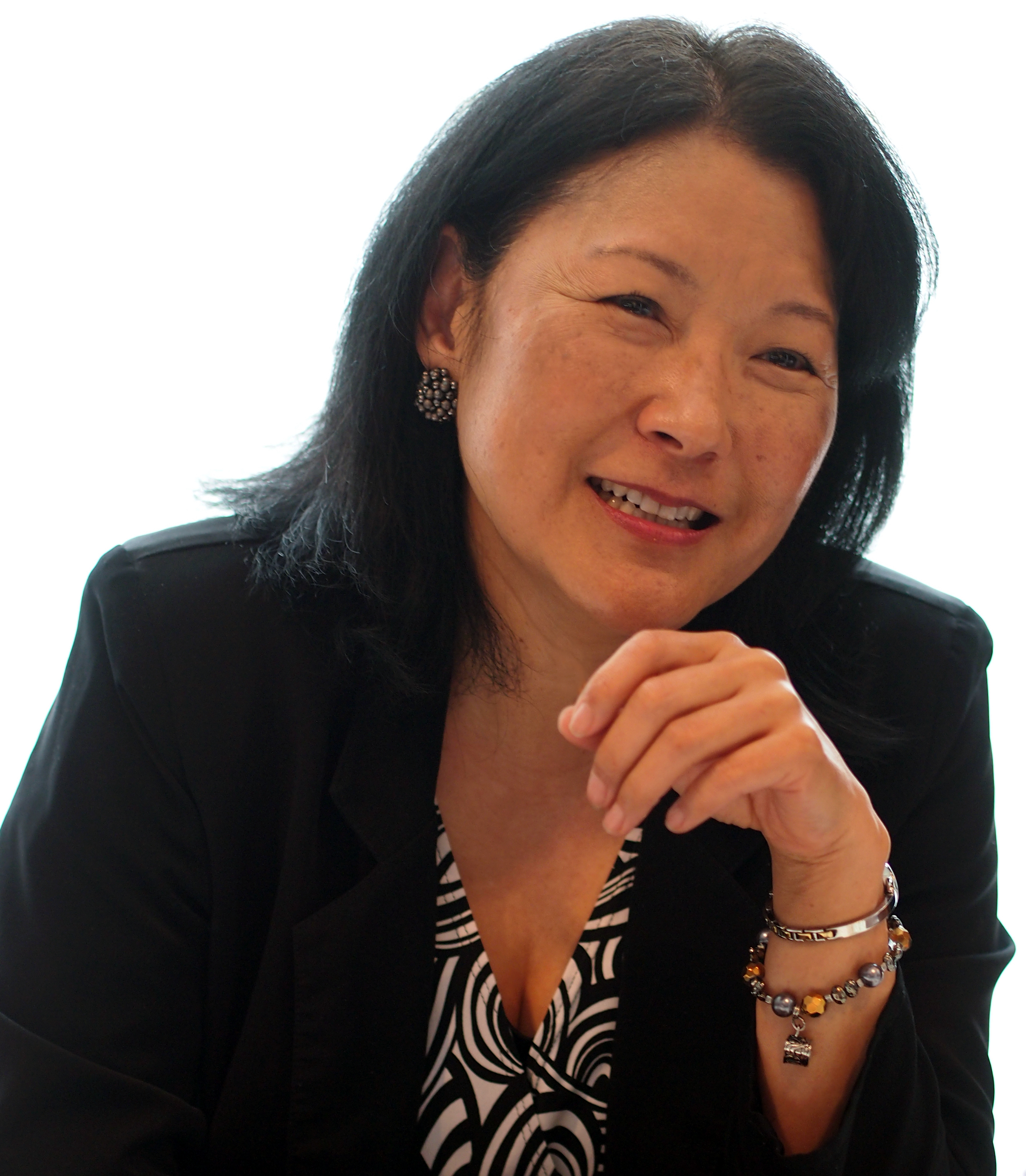 Patti Yasutake auf der FedCon 22, 9. Mai bis 12. Mai 2013, Maritim-Hotel Düsseldorf